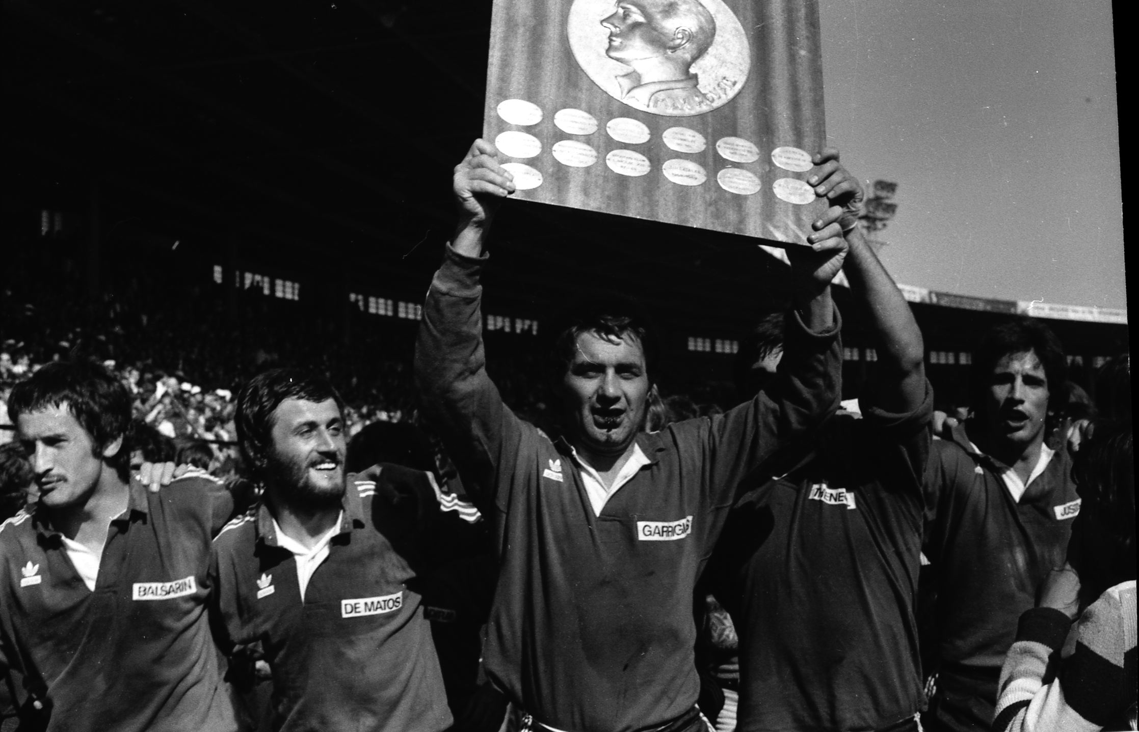 Stadium municipal de Toulouse, 1bis allées Gabriel-Biénès. 13 mai 1973. Plan rapproché sur les joueurs de l'équipe du Toulouse Olympique XIII, championne de France. Au centre de la photo un des joueurs toulousains brandit le bouclier Max Rousié (trophée du championnat de France de rugby à XIII) ; autour de lui d'autres joueurs se tiennent par les épaules. Cliché pris lors de la finale du championnat de France de rugby à XIII où l'équipe du Toulouse Olympique XIII rencontre l'équipe de Marseille.